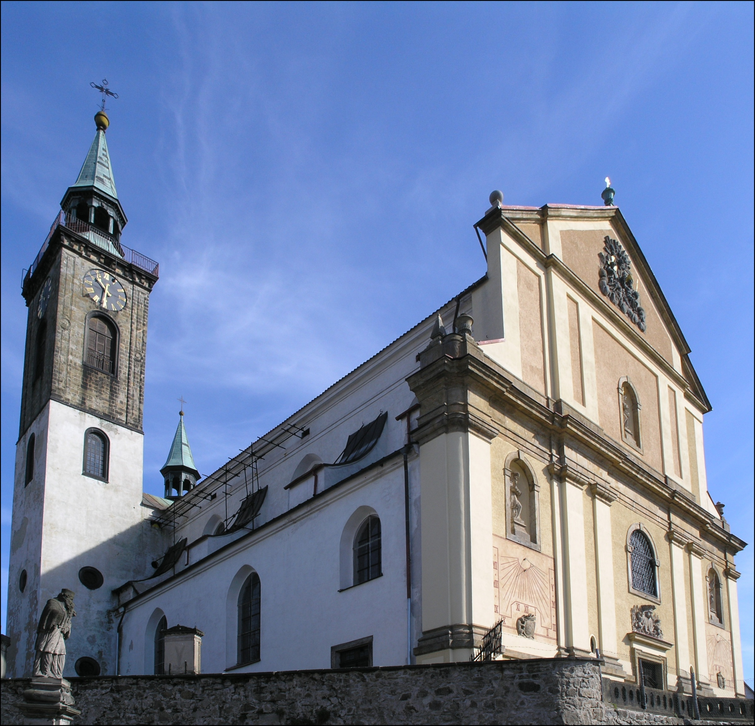 kostel svatého Mikuláše